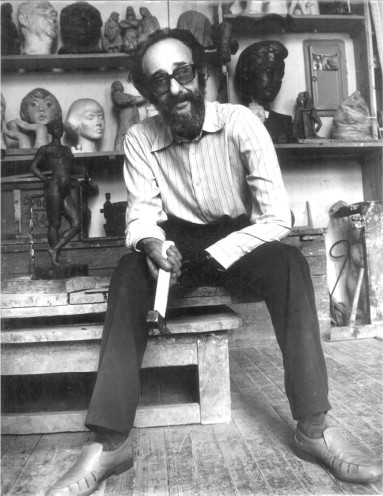 Фотография Л.С. Разумовского в мастерской. 1986.